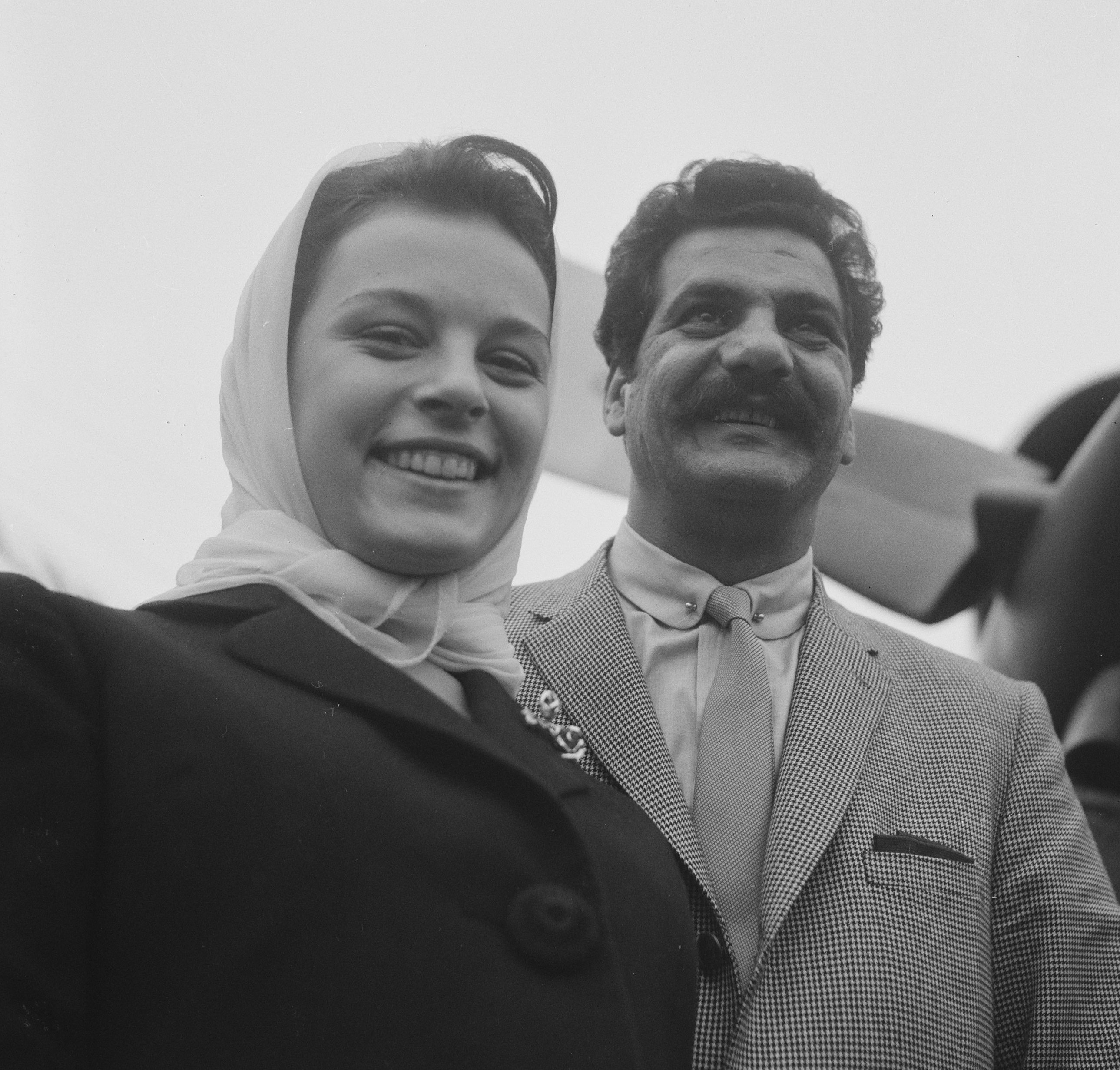 Twee Turkse filmsterren op Schiphol, links mevrouw Hülya Koçyigit, rechts de heer. Erol Tas, hoofdrolspelers in de film "Susuz Yaz -Droge Zomer" ( winnaar van de Gouden Beer in Berlijn film festival 1964)